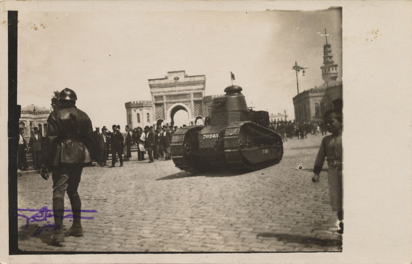 A French tank, member of the occupation army, Beyazıt, İstanbul, c. 1920 SALT Research, Tahsin İspiroğlu Collection İşgal ordusuna mensup bir Fransız tankı, Beyazıt, İstanbul, yaklaşık 1920 SALT Araştırma, Tahsin İspiroğlu Koleksiyonu